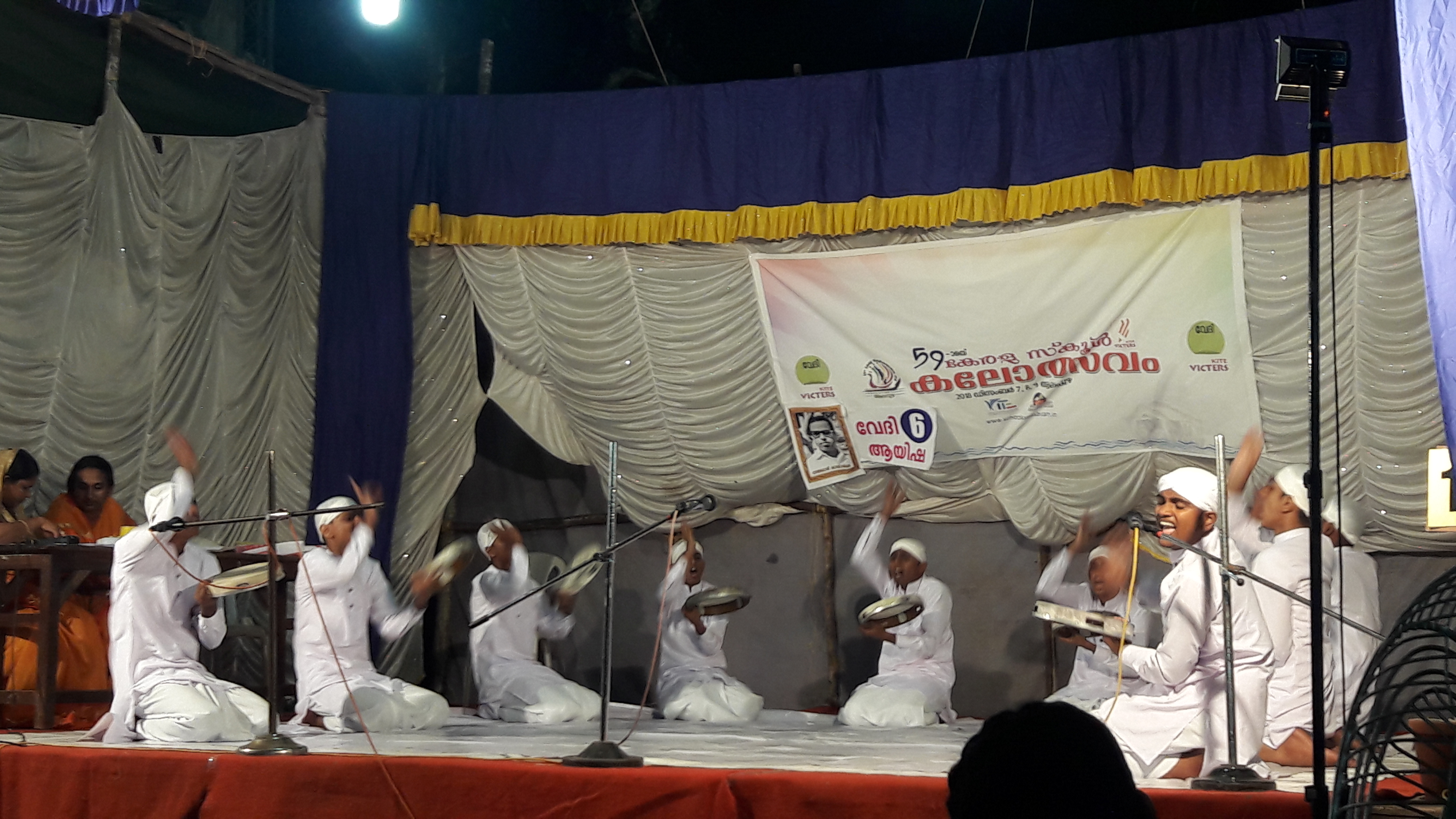 അറബനമുട്ട്